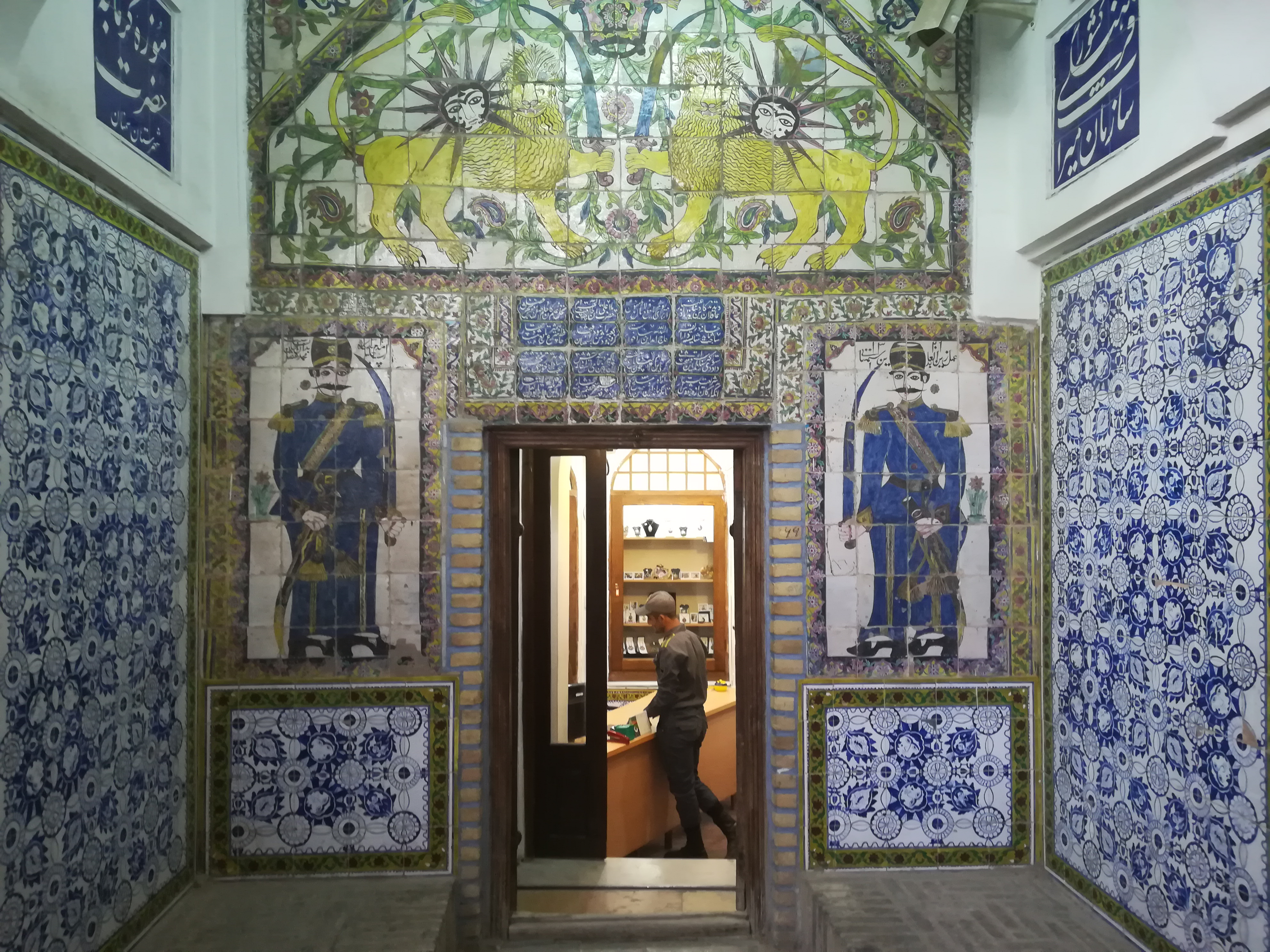 گرمابه پهنه